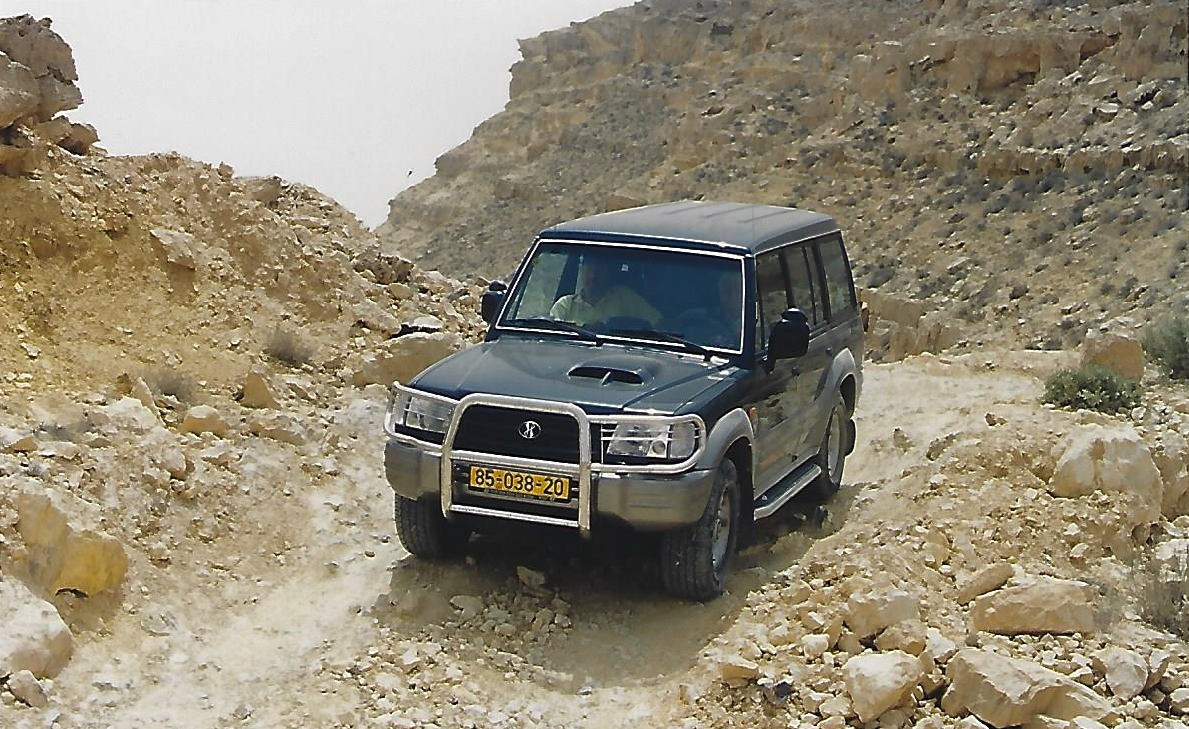 רכב בבעלות של צבי מריאנסקי ששימש ביחידת הג'יפים של המשטרה